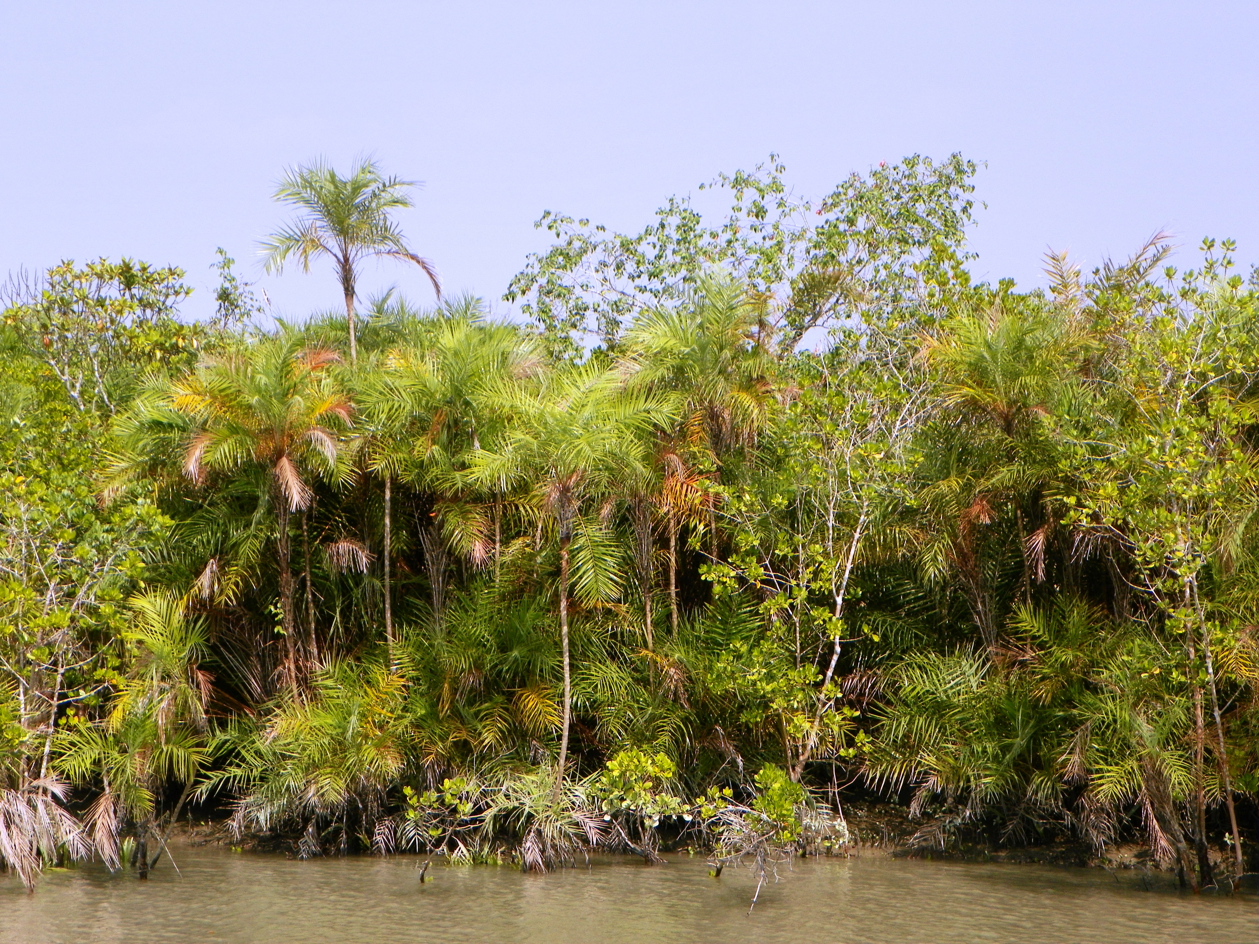 Sundarbans National Park, boat trip sundarbans42 2015-11-26, 11-26